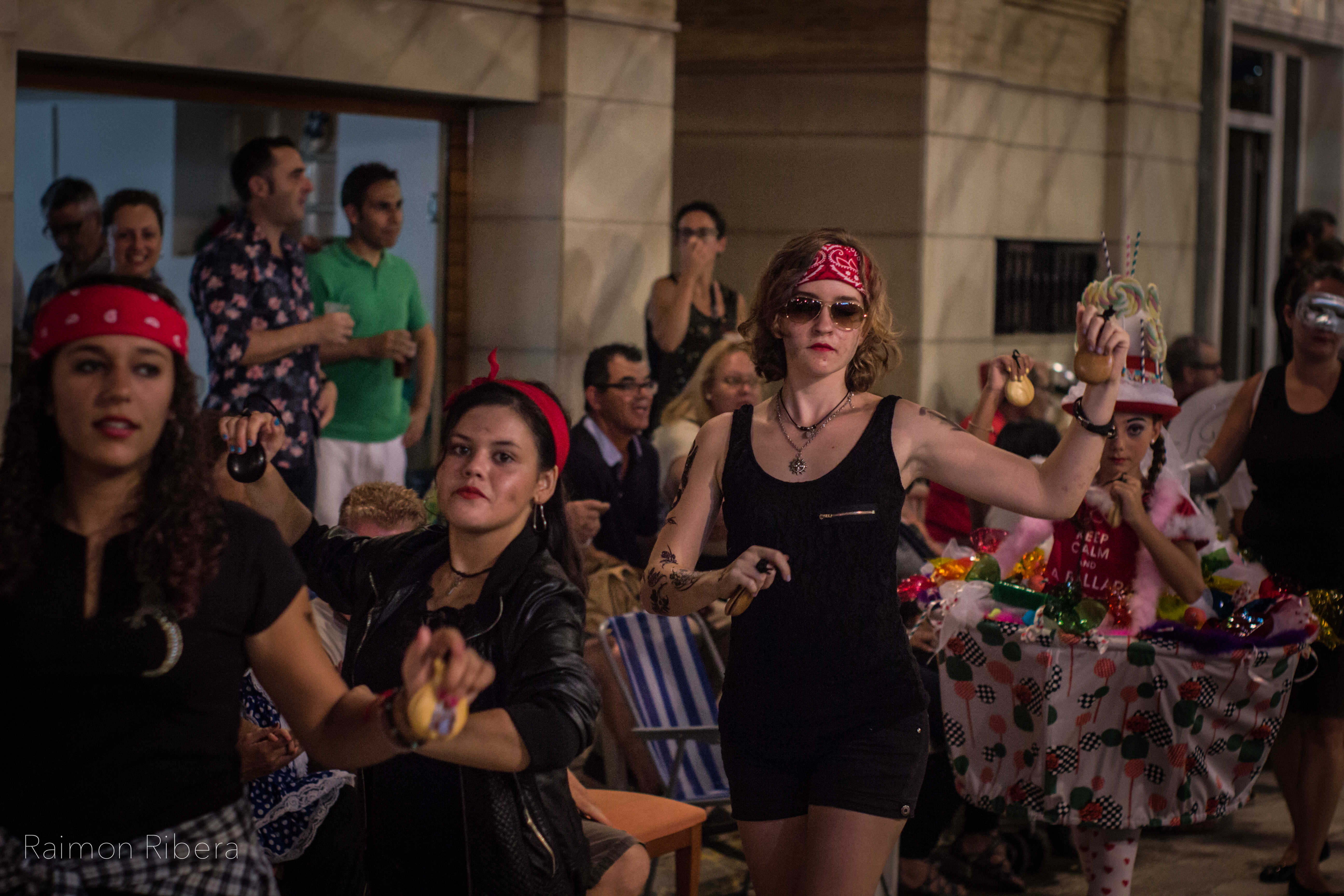 Danses de Guadassuar 2015